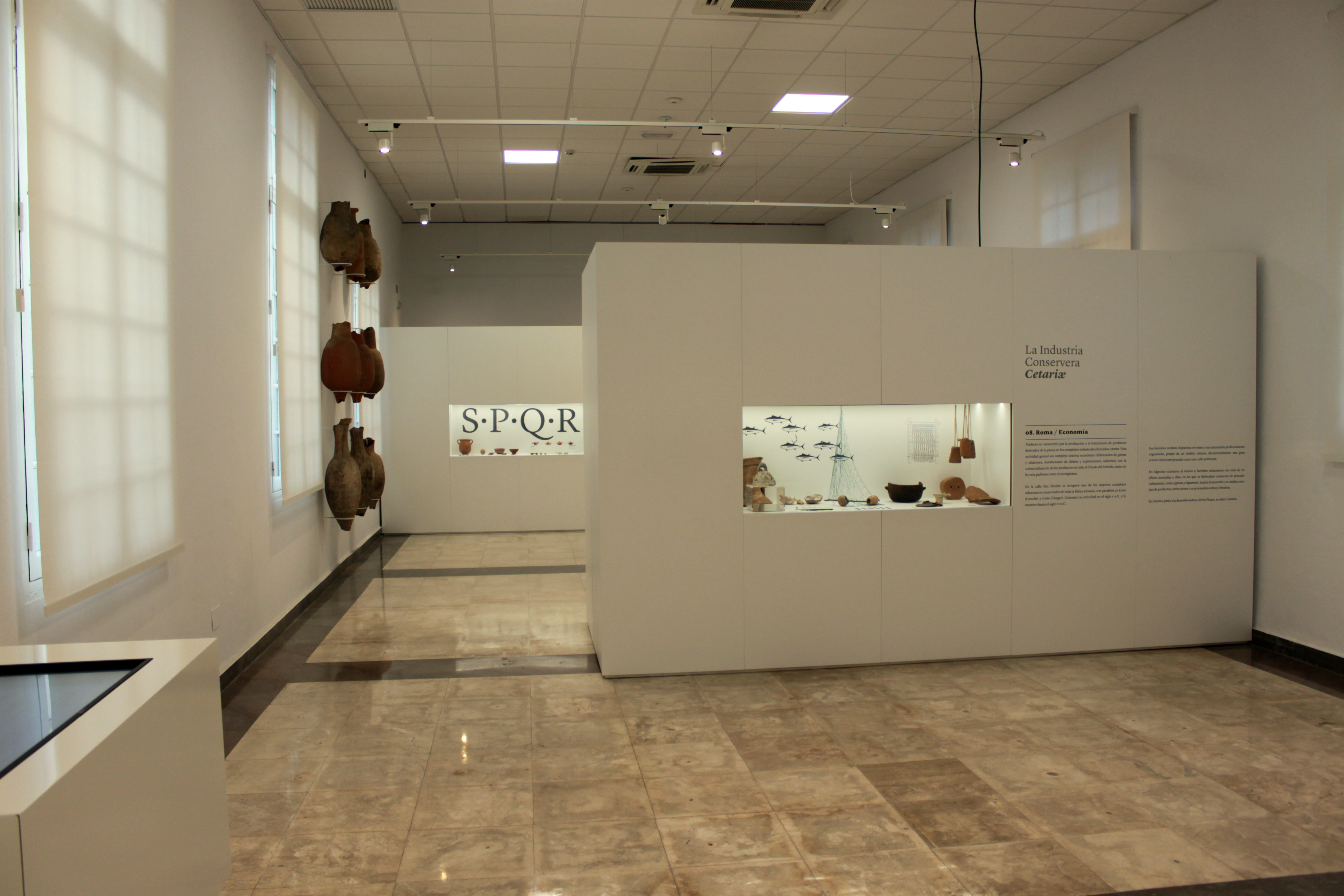 Vista de la sala dedicada a Iulia Traducta en el Museo municipal de Algeciras localizado en el Hospital de la Caridad. Algeciras, Andalucía, España.